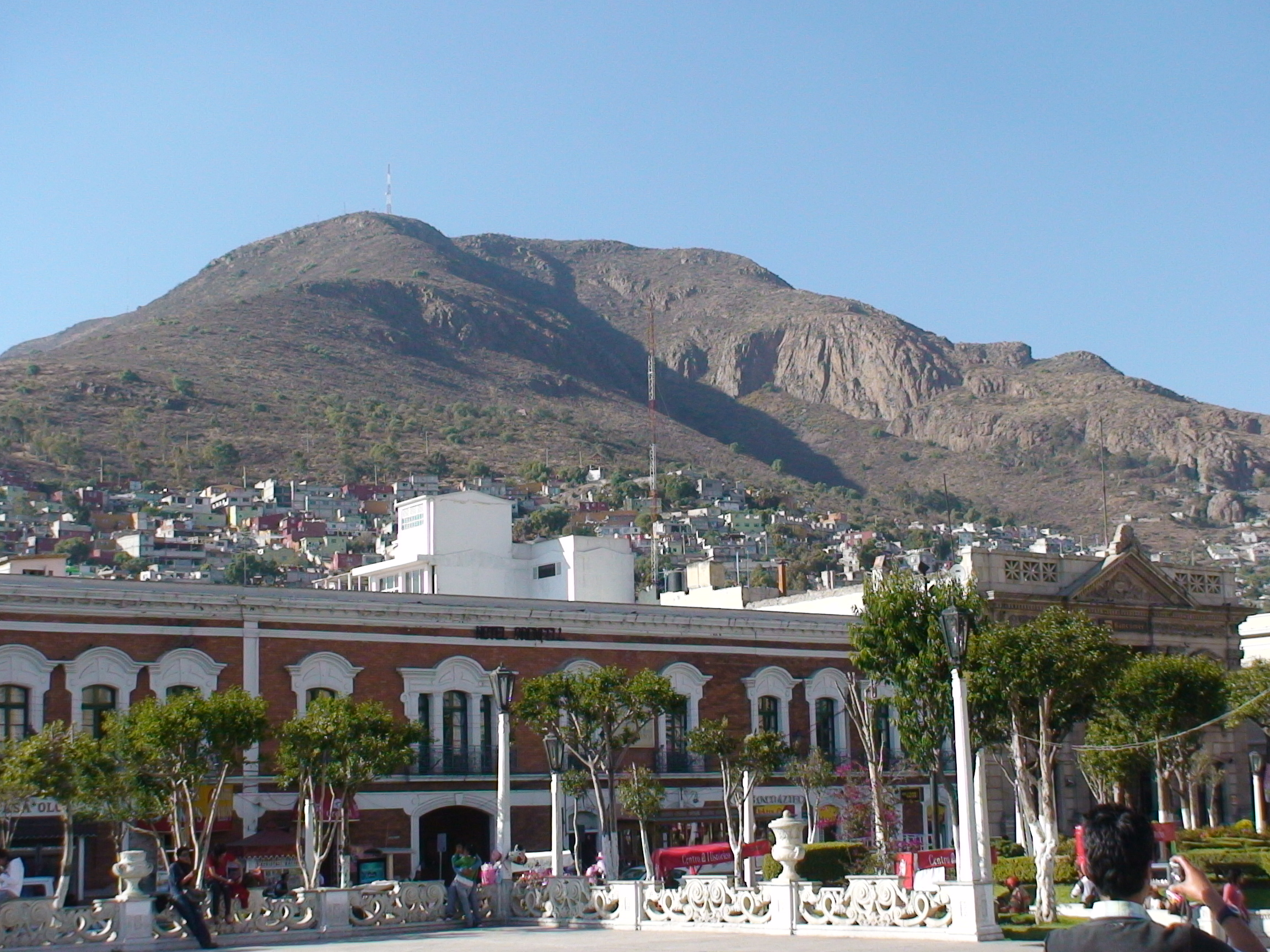 Vista del Cerro de San Cristobal en Pachuca, Hidalgo, México.